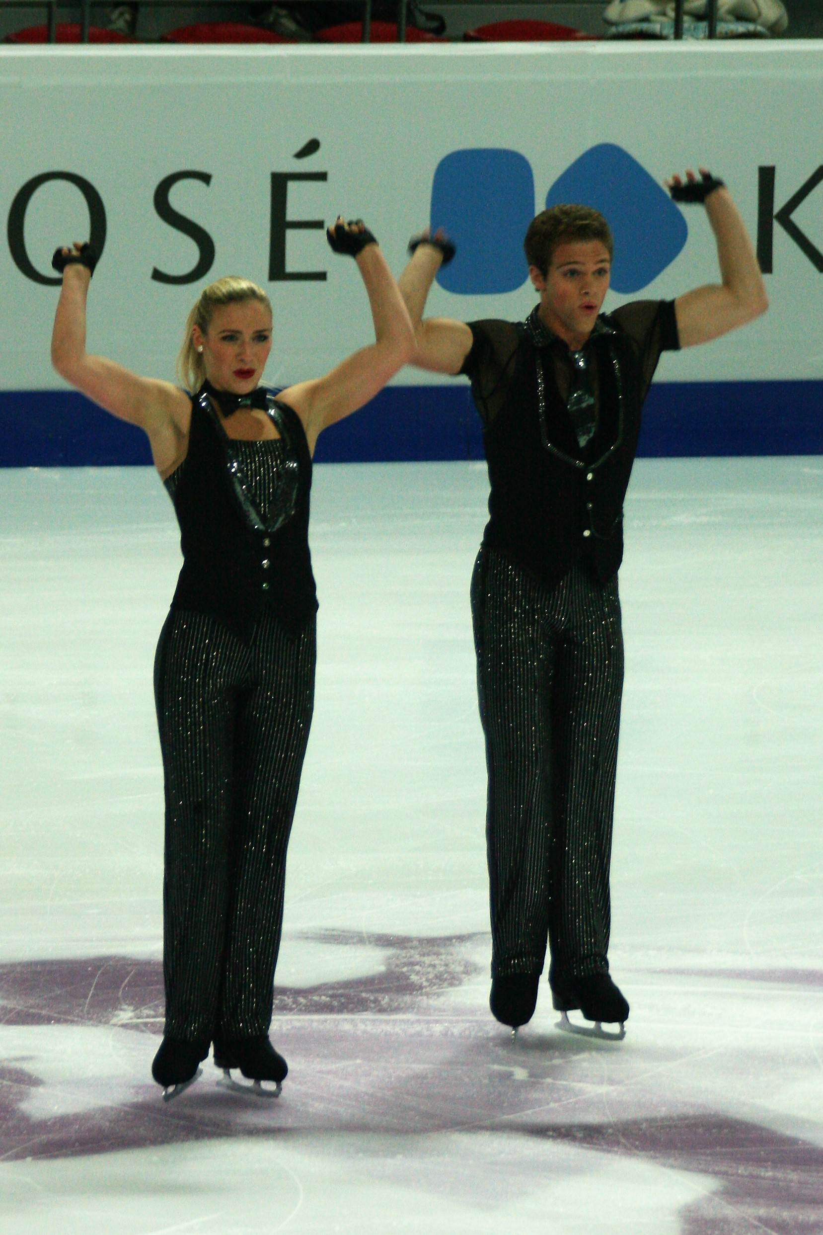 Рэйчел Парсонс / Майкл Парсонс (США) на финале Гран-при по фигурному катанию среди юниоров 2016-2017